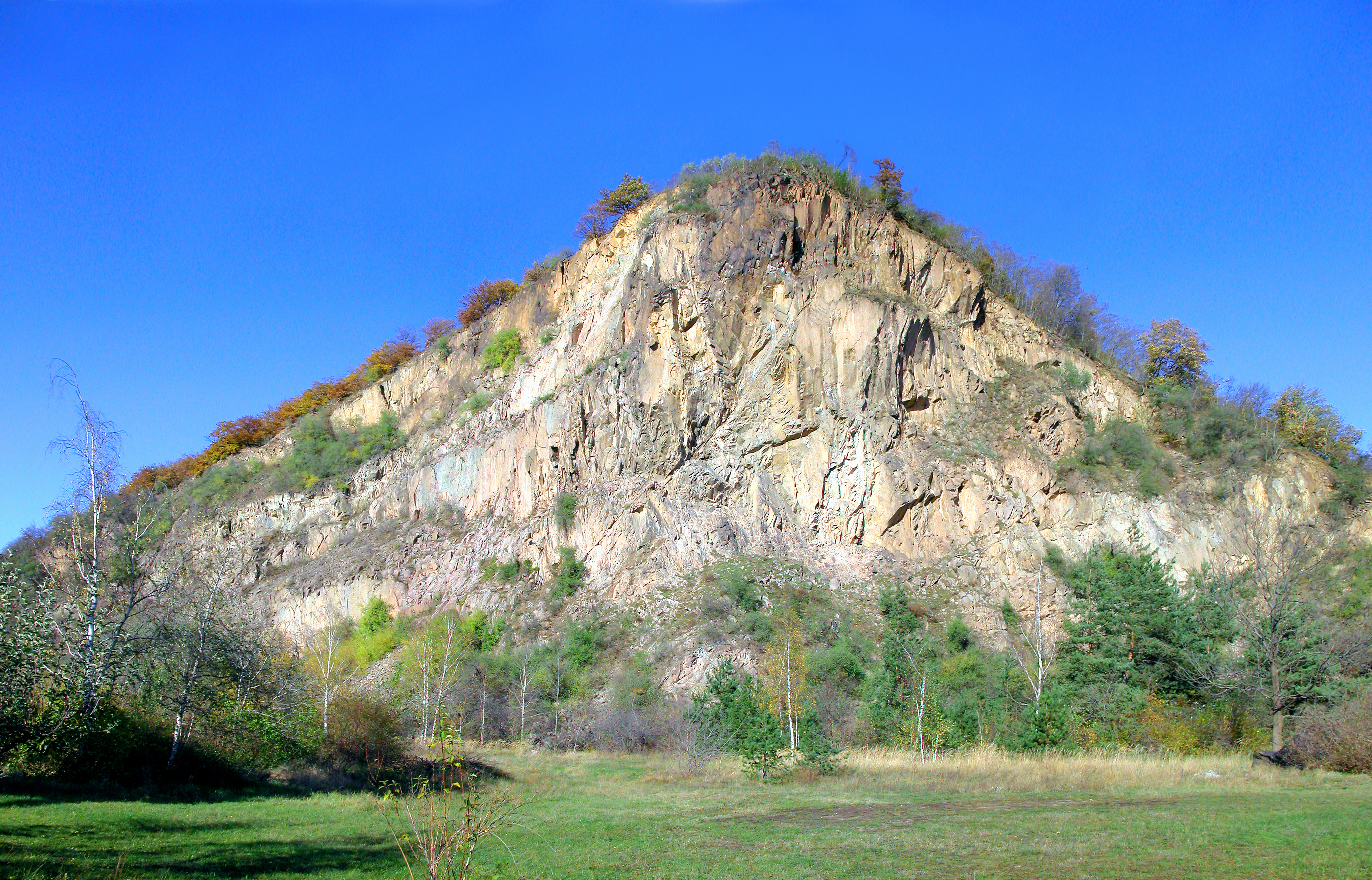 05.11.2009 01640 Sörnewitz (Coswig): Spaargebirge, der Boselfelsen. Sicht von Süden zur Boselspitze (GMP: 51.137998,13.514908). [DSCN39942-39944.TIF]20091105135MDR.JPG(c)Blobelt